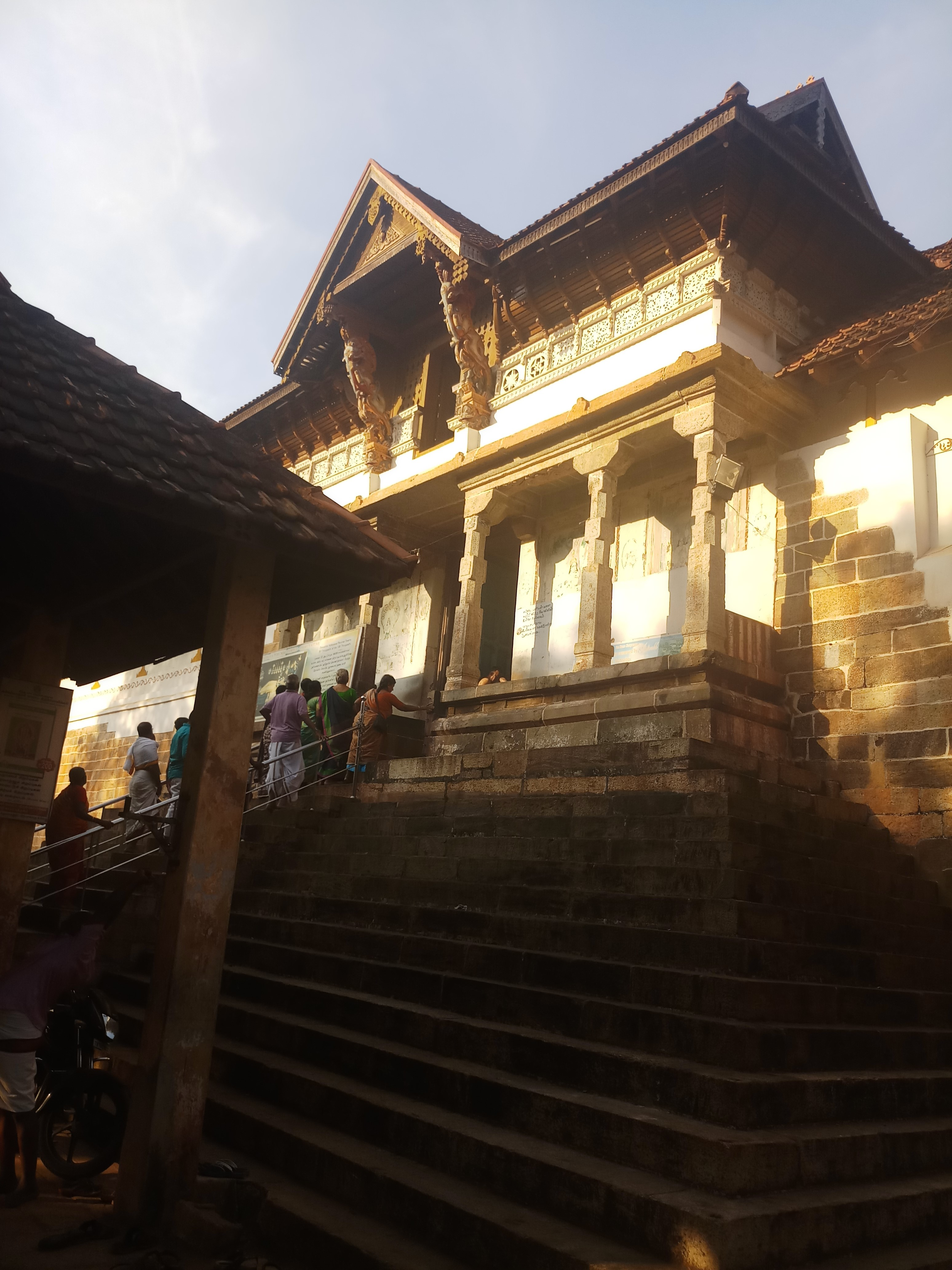 திருவட்டாறு, ஆதி கேசவ பெருமாள் கோயில் முன்தோற்றம்